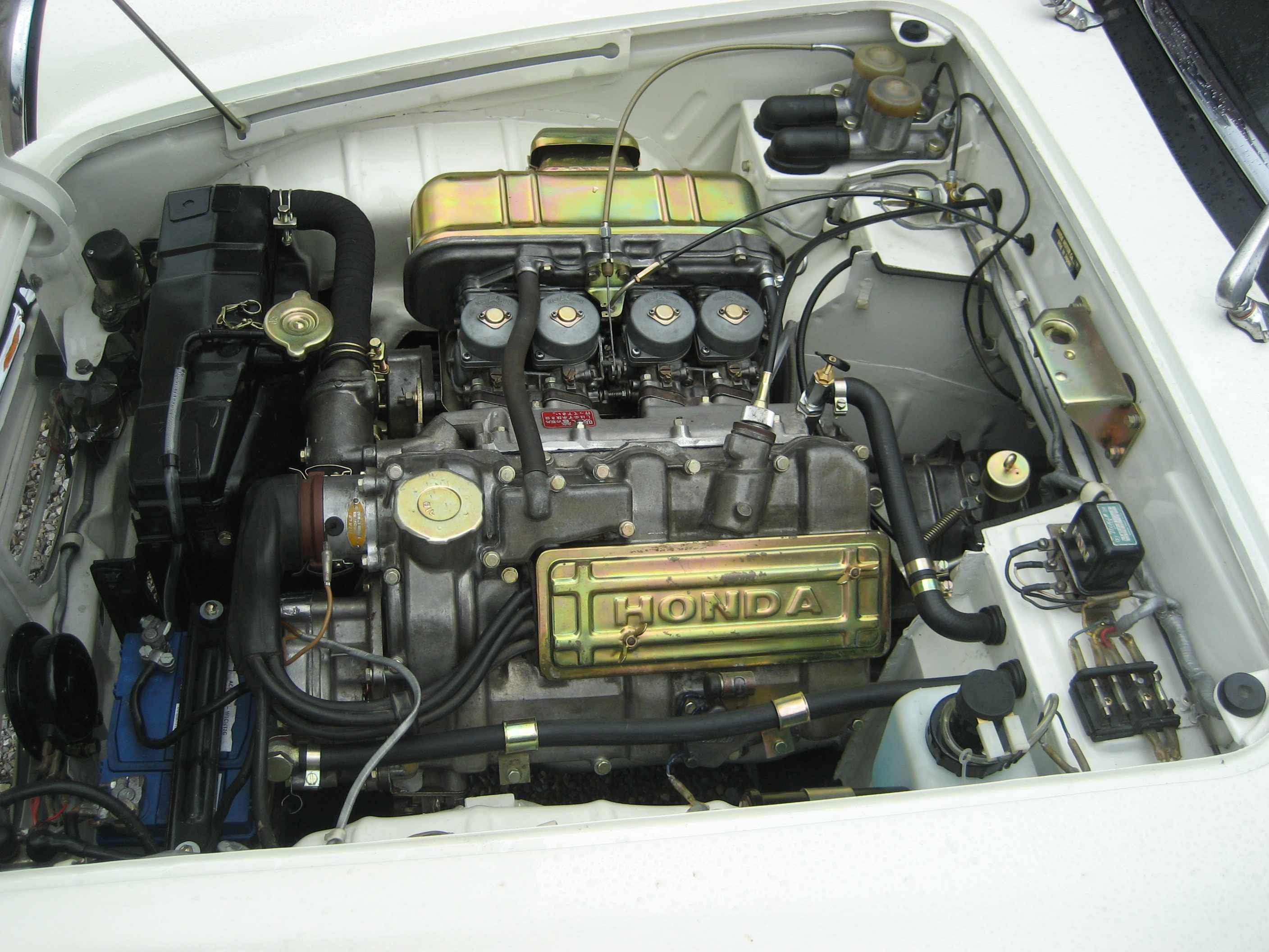 Honda S500 Motorraum von links